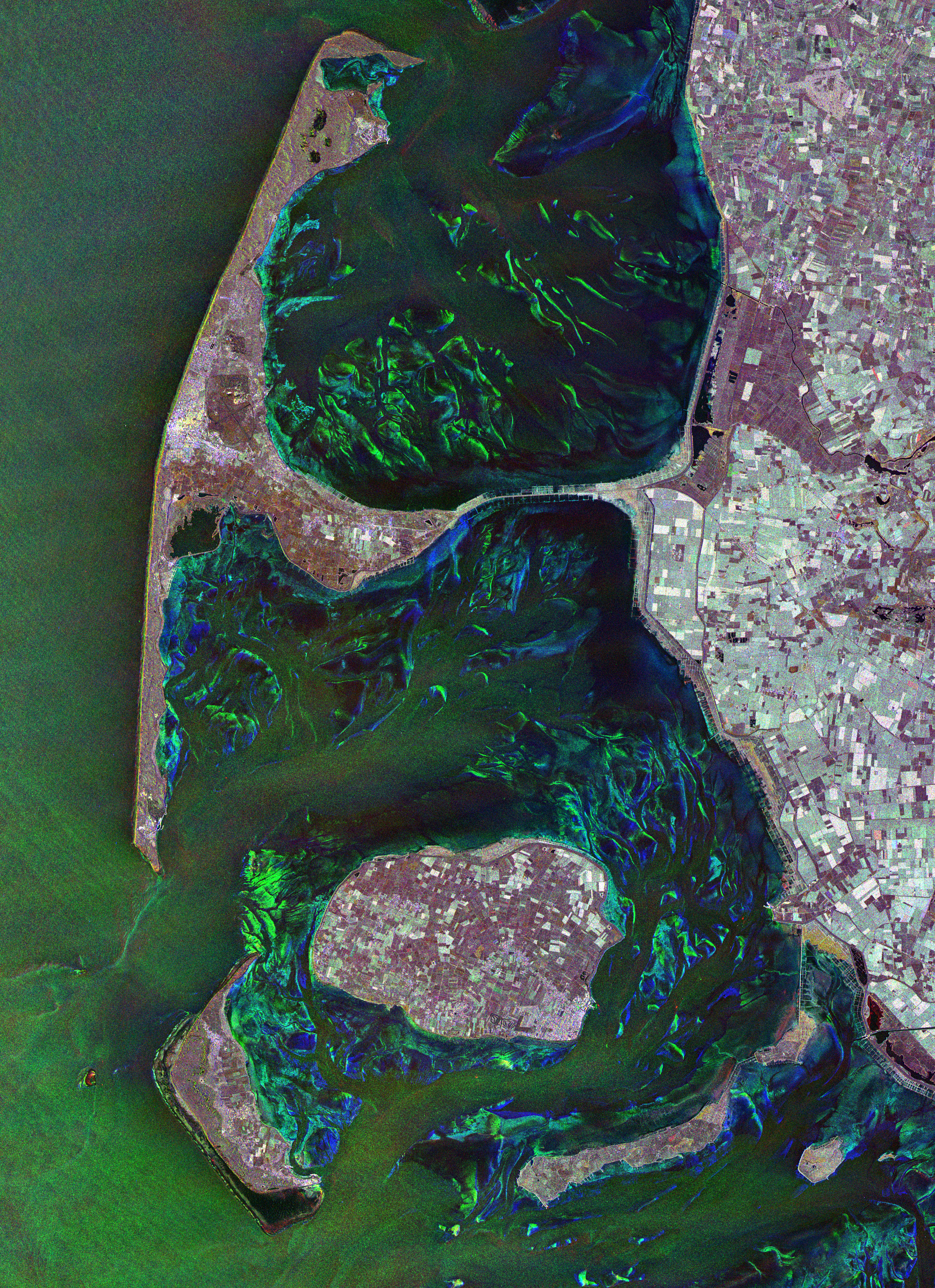 Inseln Sylt, Föhr und Amrum. Originalbeschreibung: Für die Erstellung dieser Aufnahme wurden drei Bilder von TerraSAR-X übereinander gelegt. Die einzelnen Datensätze wurden am 22., 24. und 27. Oktober 2007 aufgenommen. Alle Gebiete, in denen zwischen den Aufnahmezeitpunkten Veränderungen stattfanden erscheinen in Blau und Grün - insbesondere die durch die Gezeiten beeinflussten Gebiete des Wattenmeeres. Hier verändert sich durch den Wechsel zwischen Ebbe und Flut der Wasserstand von Aufnahme zu Aufnahme. Die Landflächen erscheinen auf Grund der relativ geringen Veränderungen innerhalb der fünf Tage in Grau- und Brauntönen